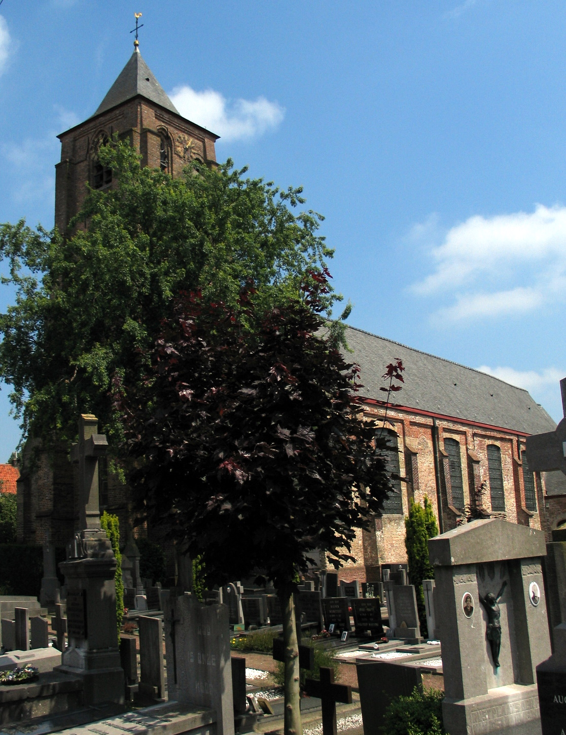 Sint-Laurentiuskerk van Sint-Laureins (België)